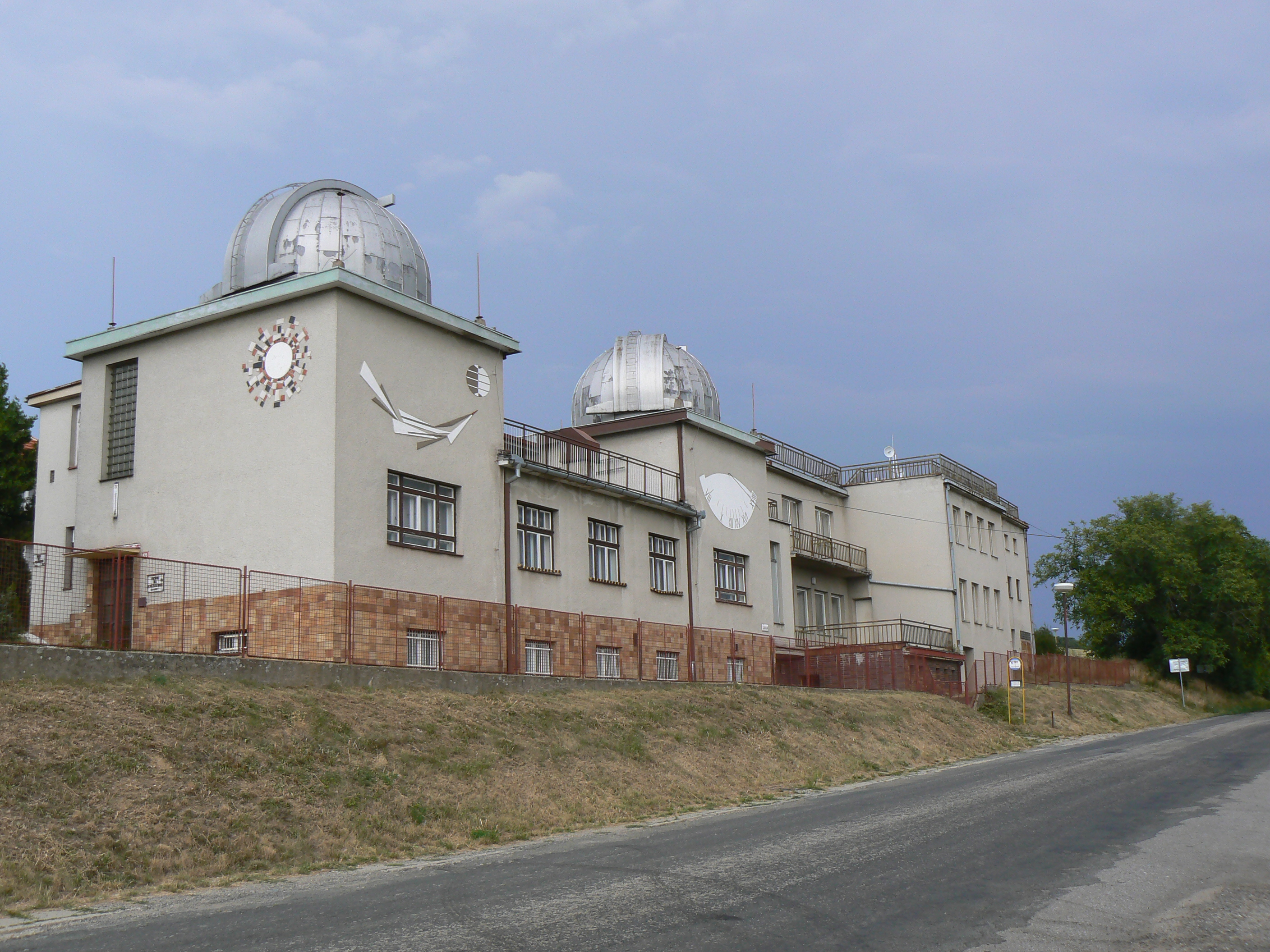 Hvězdárna ve Ždánicích, okres Hodonín